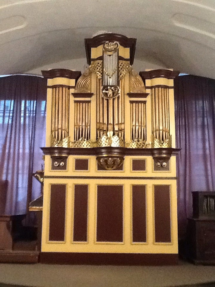 відреставрований орган В.Півновим. Львівський музей історії релігії. Бароковий орган кінця XVII століття роботи німецького майстра Людвіга Фогеля.